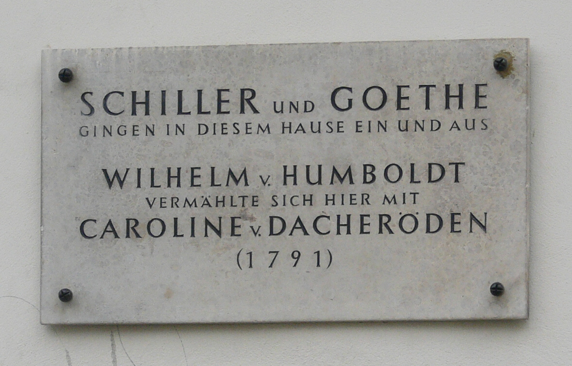 Haus Dacheröden am Anger in Erfurt